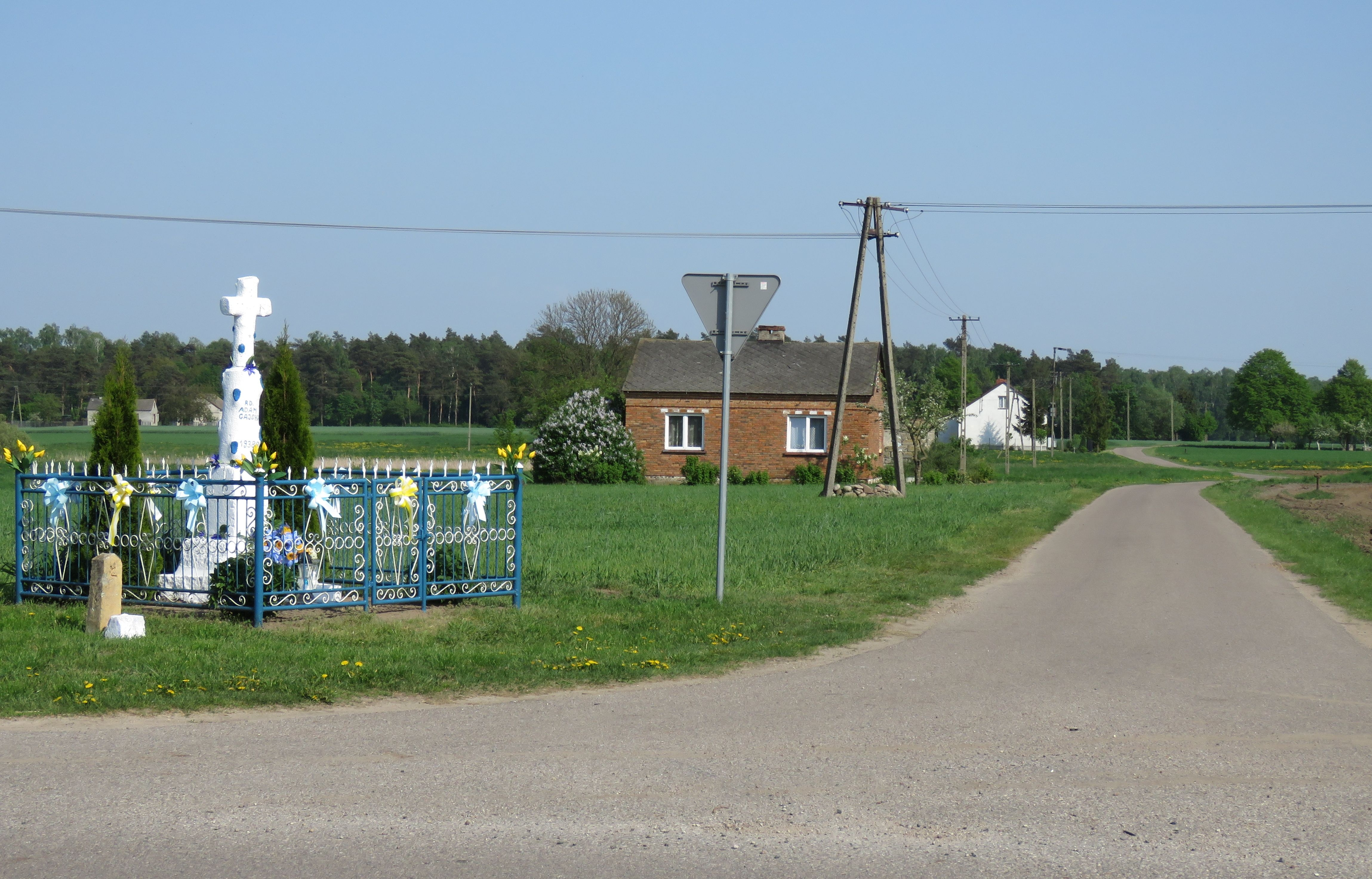 Petrykozy, gm.Zawidz